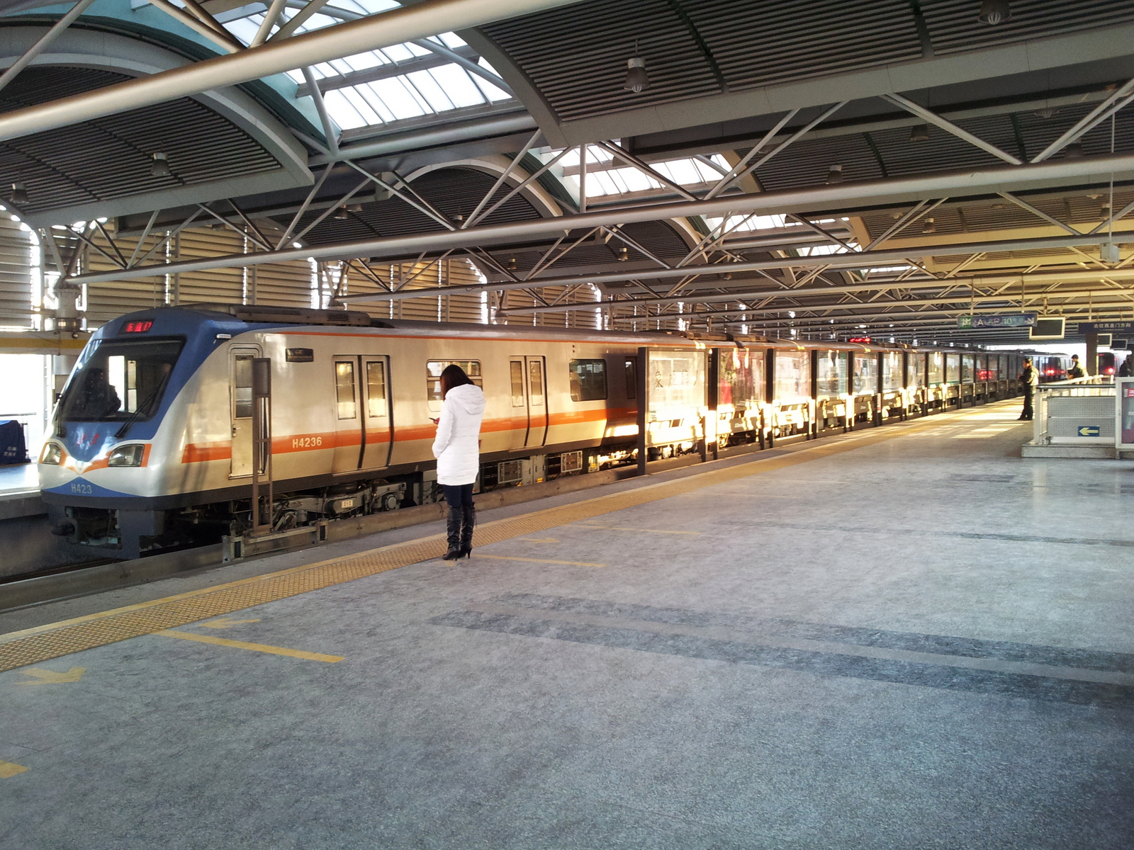 北京地铁13号线知春路车站，是和10号线的换乘站。站台层横跨知春路，采用侧式站台。